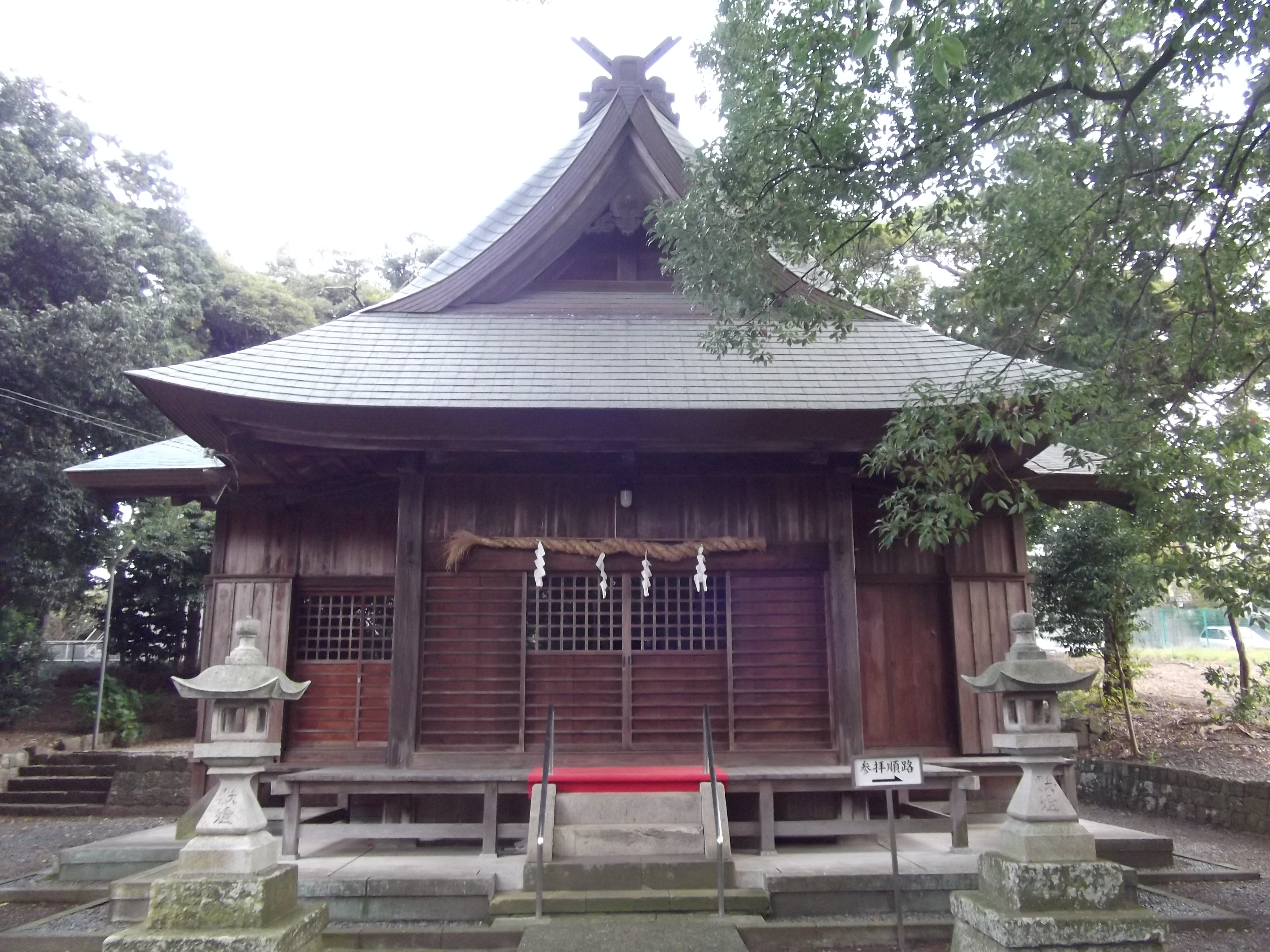 伊勢神明社 (静岡市)の拝殿。